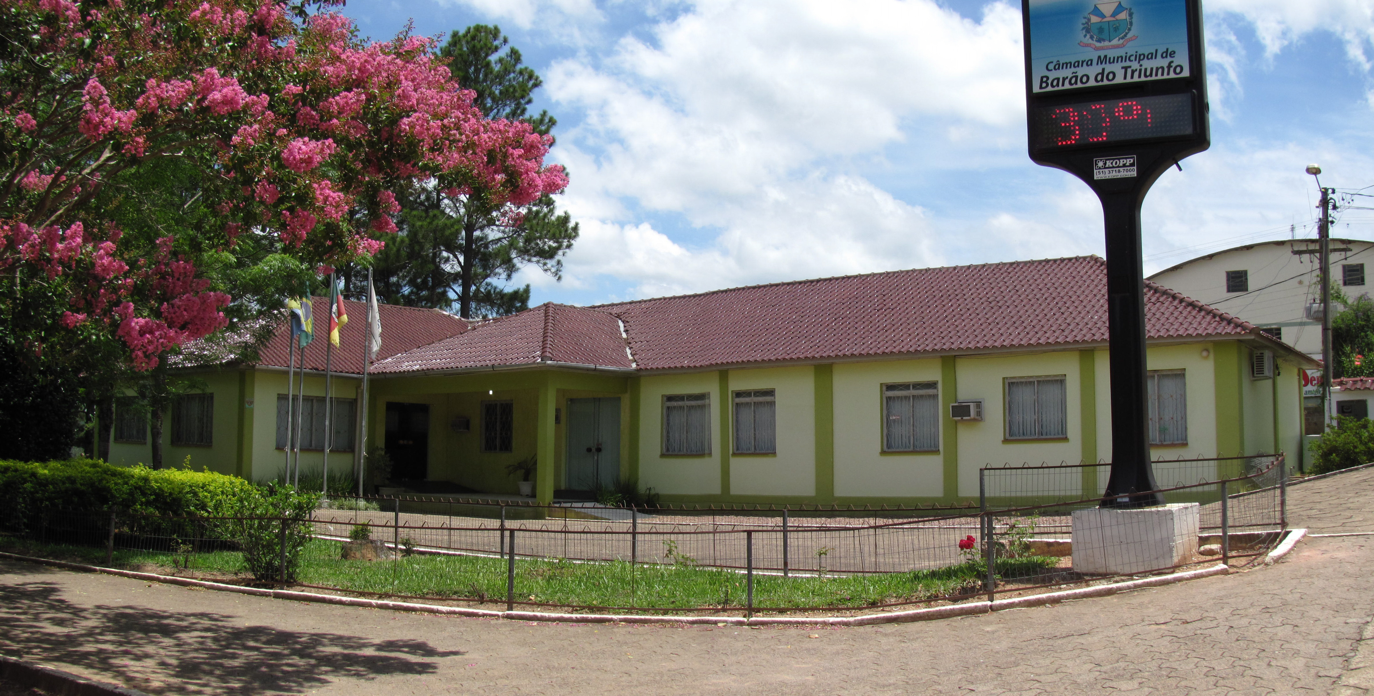 Câmara de vereadores de Barão do Triunfo